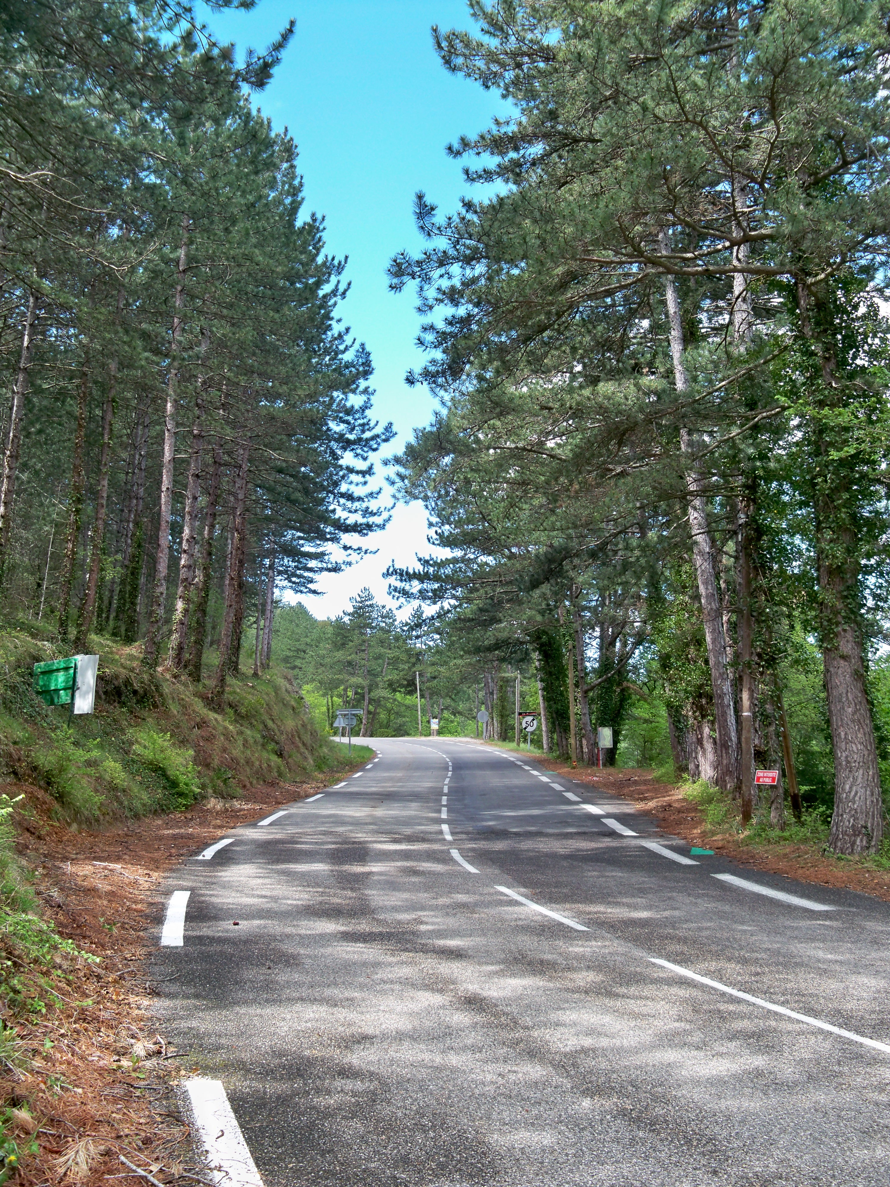 route vers le Mont Ventoux, à la source du Groseau, Malaucène